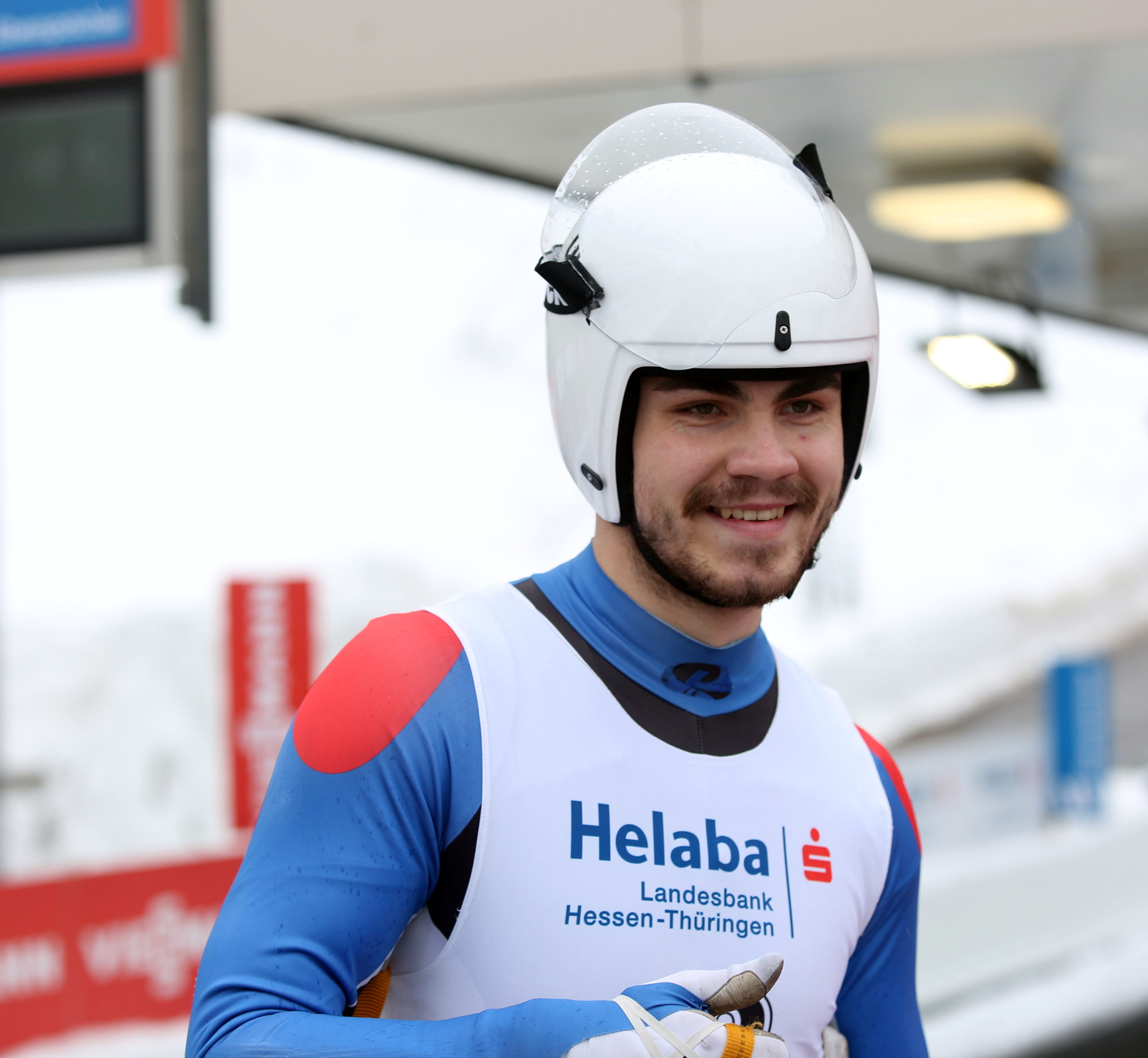 Marek Solcansky beim HELABA Nationscup der Doppelsitzer in Oberhof 2017